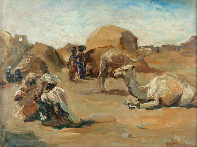 Lady Helena Gleichen Camels and Bedoueen